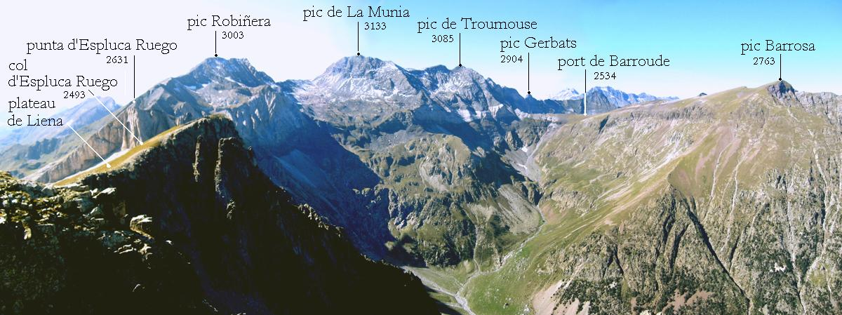 Vue panoramique (composée de 5 photos) du cirque de Barrosa, prise de la sierra de Liena, vers le nord-ouest, avec incrustations identifiant les différents cols et sommets, de la punta d'Espluca Ruego au pic Barrosa.